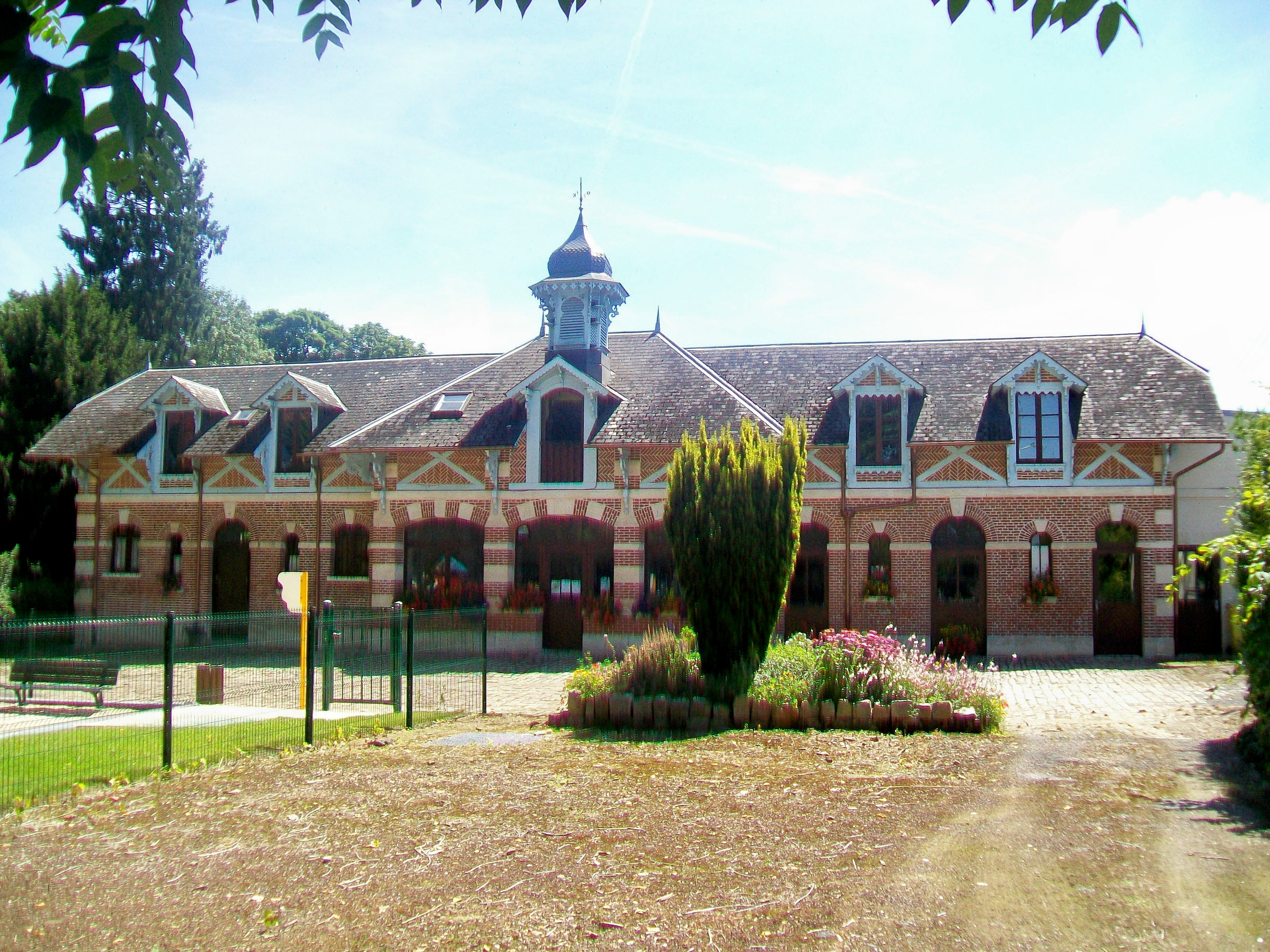 La bibliothèque municipale dans les anciennes écuries du château, avenue Henri-Besse.